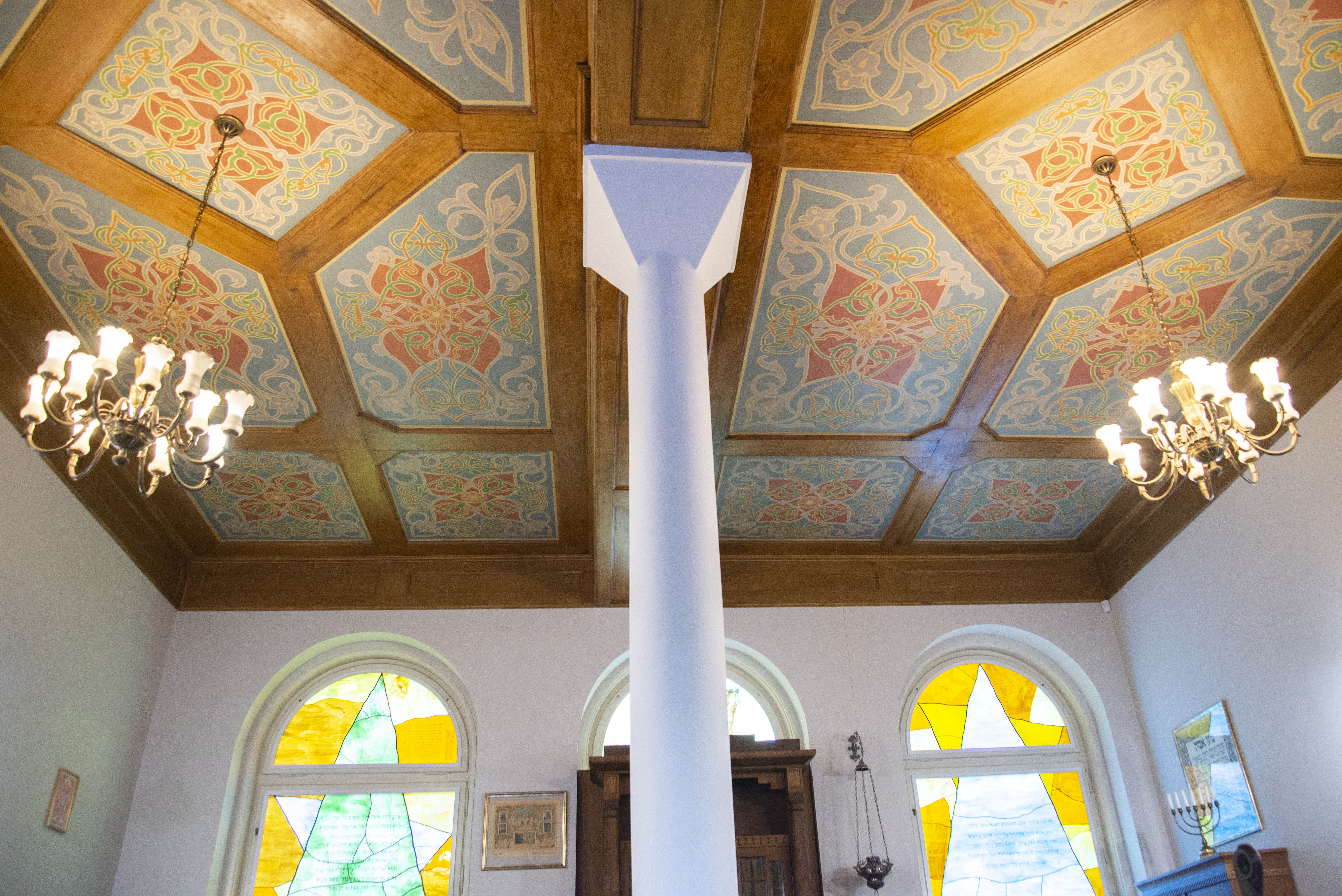 Shul (kleiner Gebetsraum / kleine Synagoge)